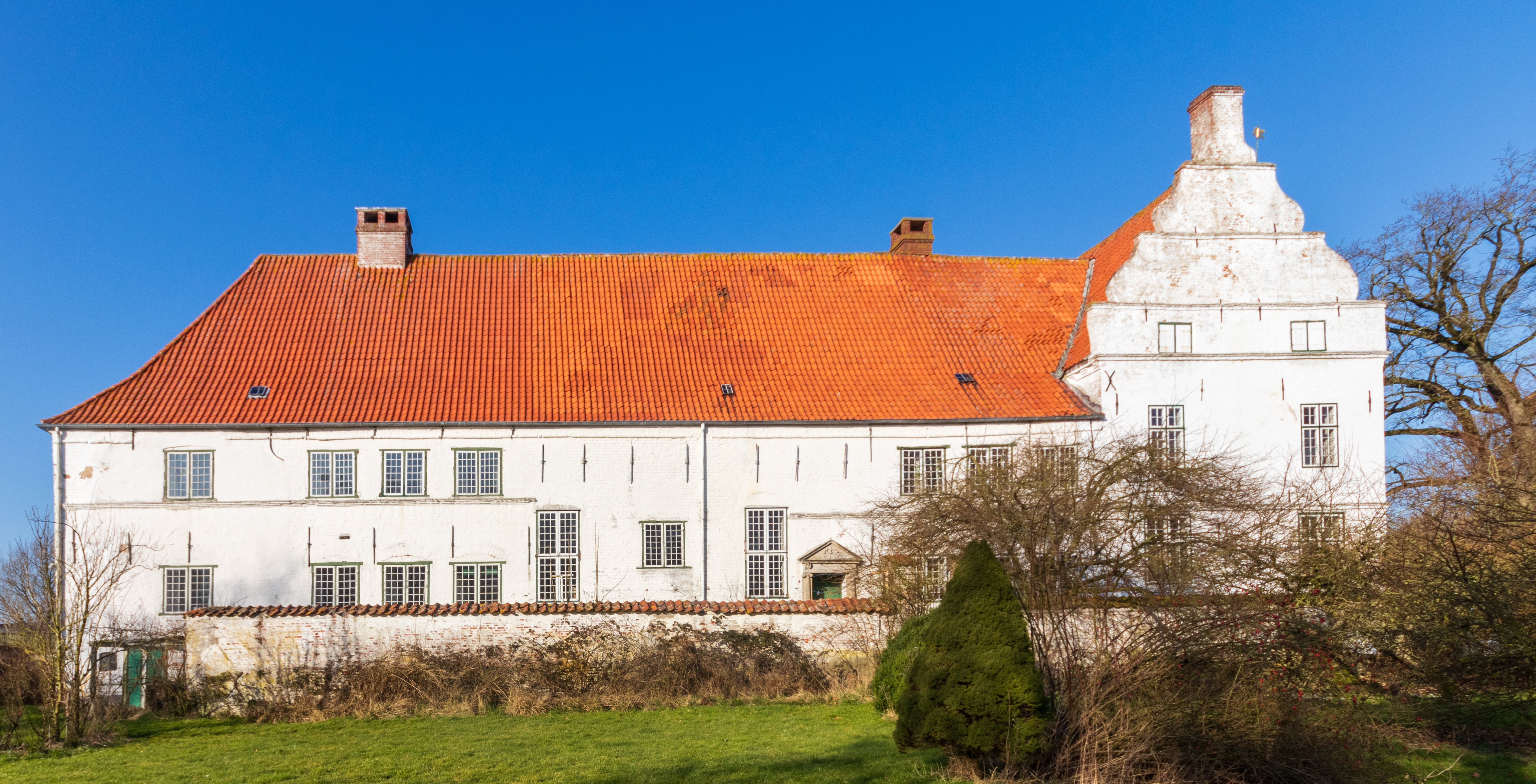 Herrenhaus Hoyerswort Gartenfassade